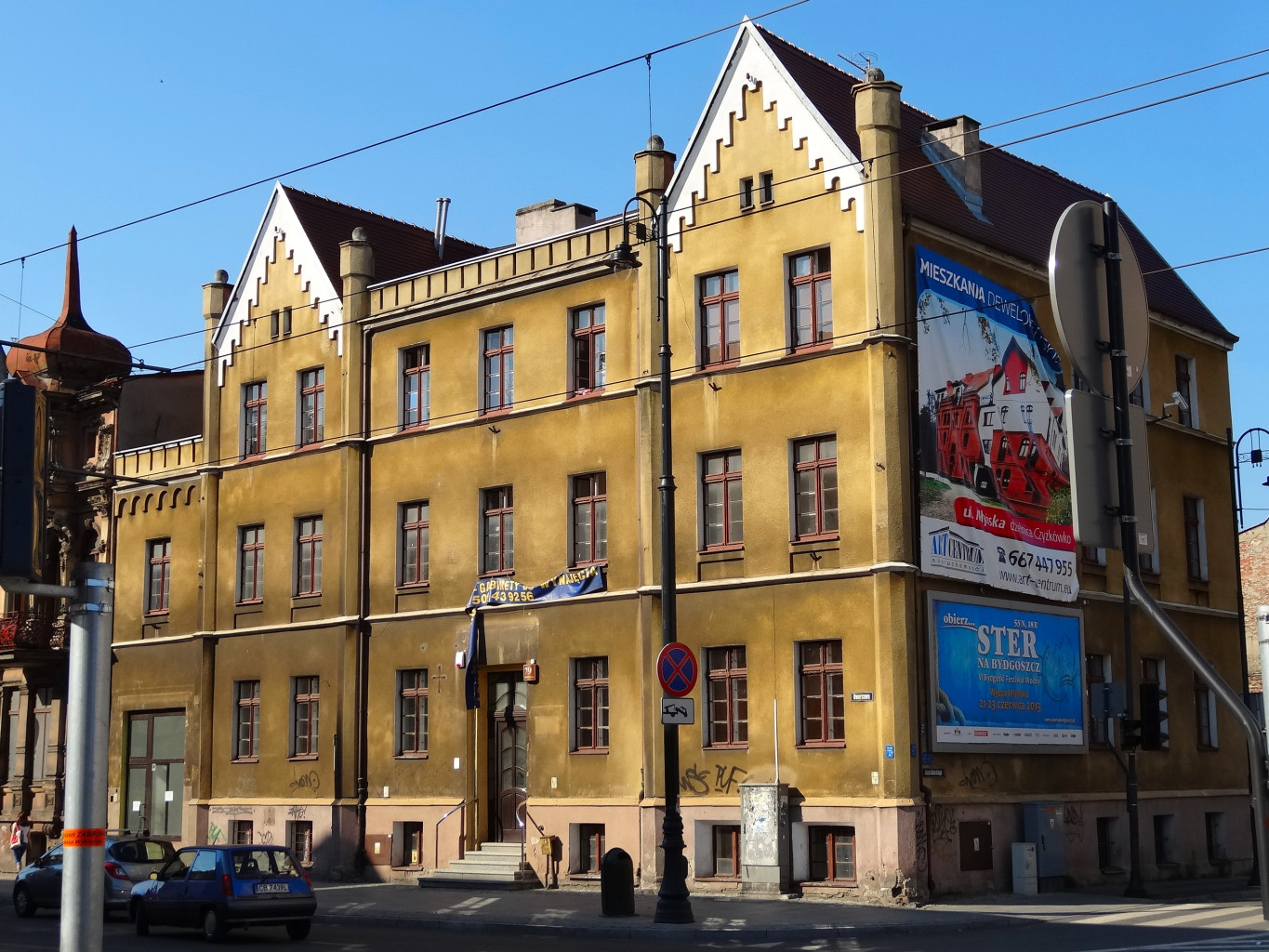 Kamienica przy ul. Dworcowej 79 w Bydgoszczy